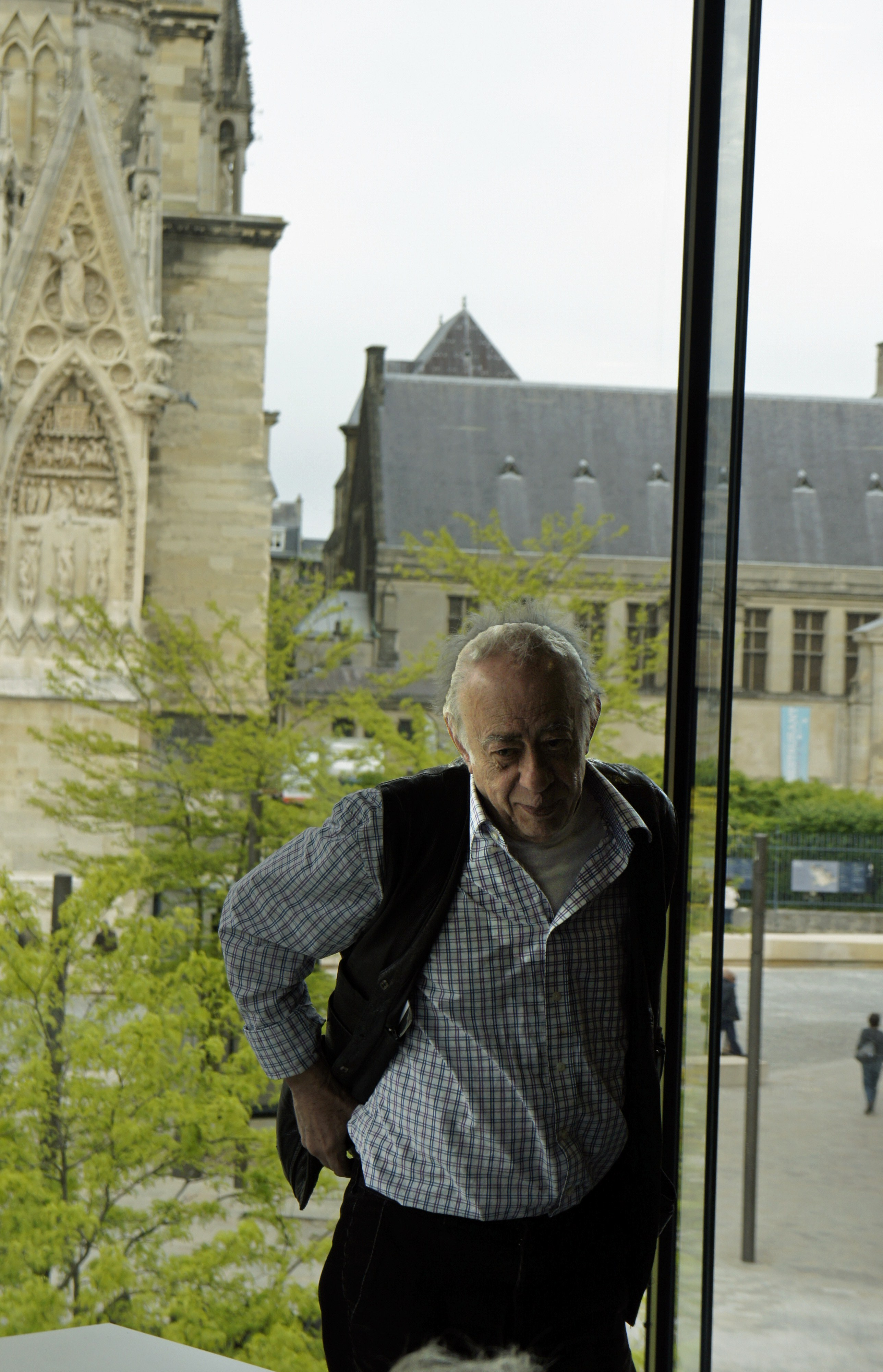 V. Alexakis, dédicaces et entretient, médiathèque Jean Falala en 2013.